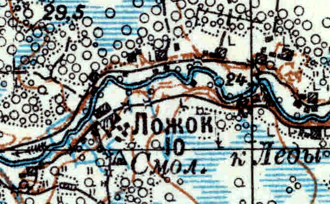 Топографическая карта Ленинградской области, квадрат VIc-27 (Залустижье), деревня Ложок